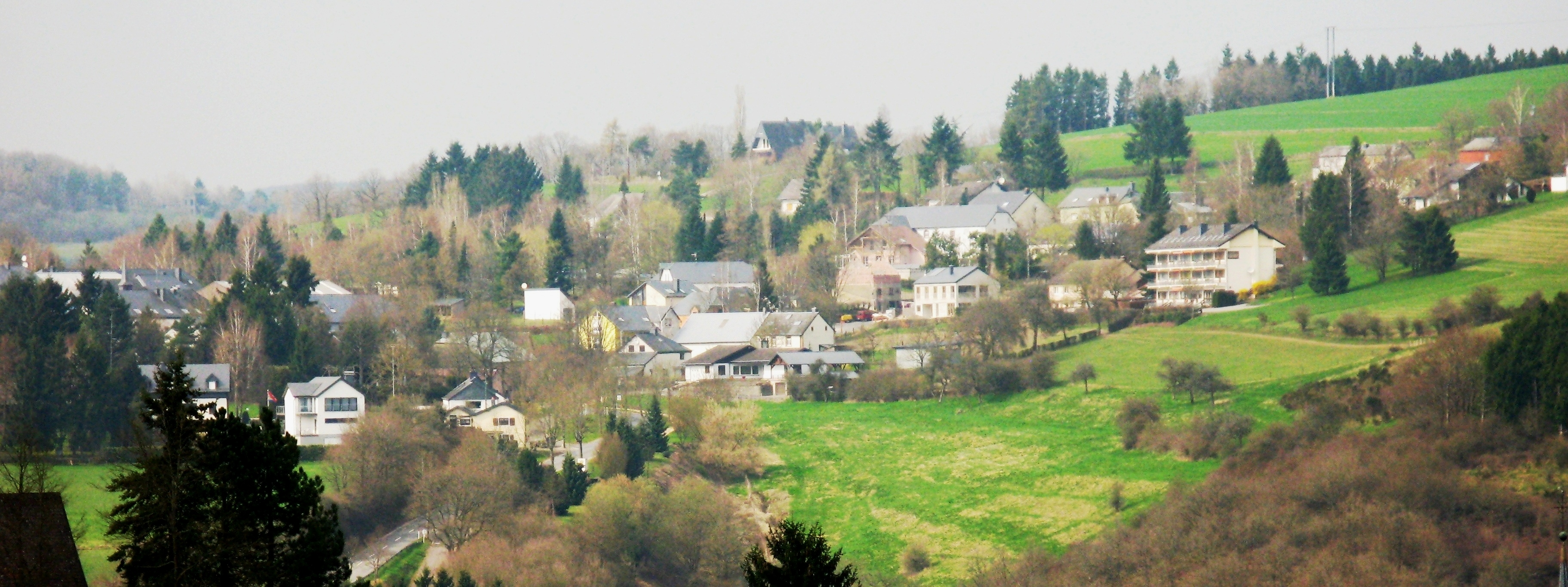 Léifreg vun Ënsber aus gesinn.